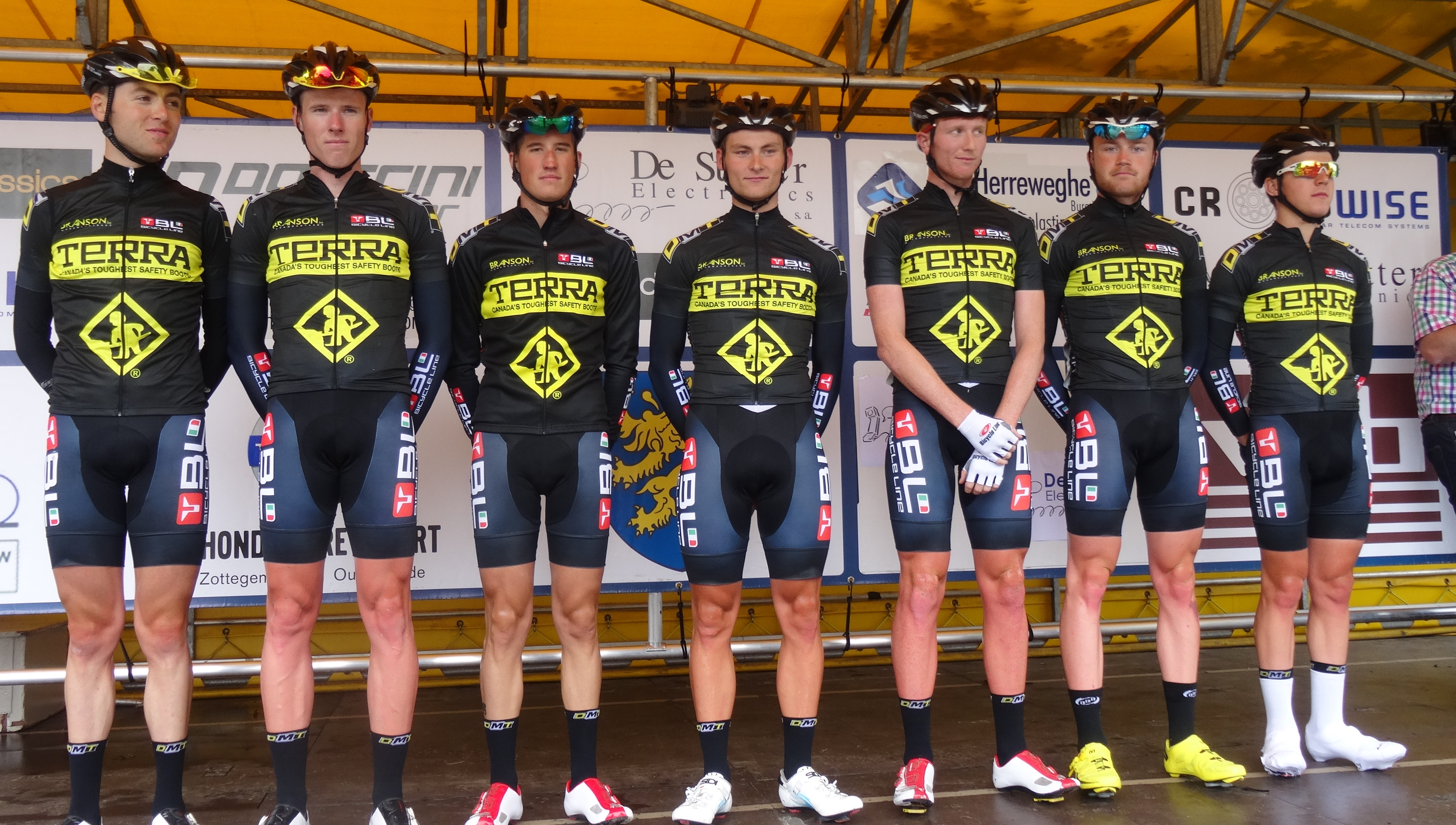 Reportage photographique réalisé le samedi 5 juillet à l'occasion du départ et de l'arrivée du Circuit Het Nieuwsblad espoirs 2014 à Grotenberge (Zottegem), Belgique.